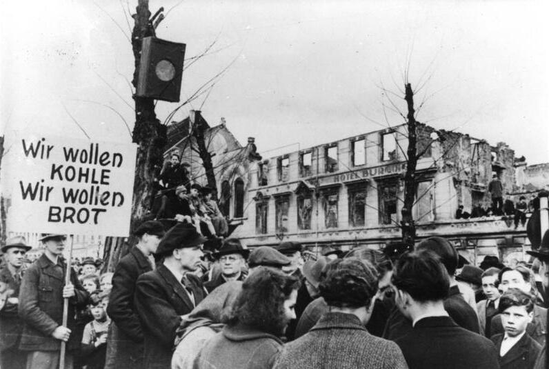 Krefeld, Hungerwinter, Demonstration ADN-ZB- Röhnert Streiks u. Unruhen i. Deutschland U.B.z.: Wegen der katastrophalen Ernährungslage legten am Montag, 31.3.1947, in Krefeld Tausende die Arbeit nieder und versammelten sich zu einer Protestkundgebung auf dem Karlsplatz. Zahlreiche Transparente brachten die Forderungen der Arbeiter zum Ausdruck.